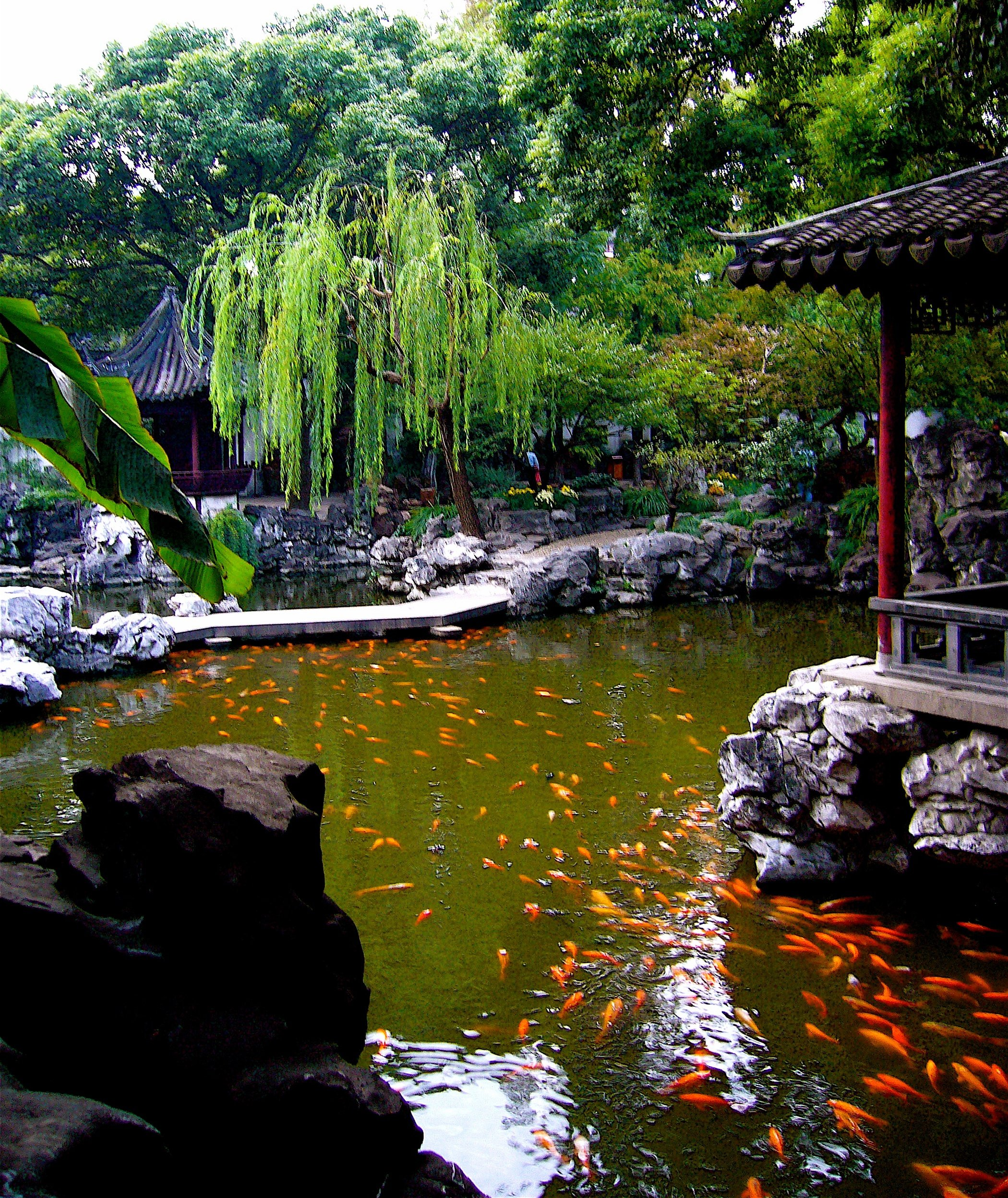 Yuyuan Garden, Shanghai